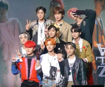 27일 오후 서울시 용산구 한남동 블루스퀘어에서 펜타곤 8번째 미니앨범 'Genie:us ' 발매 기념 쇼케이스가 열려 펜타곤이 단체 포토타임을 갖고 있다